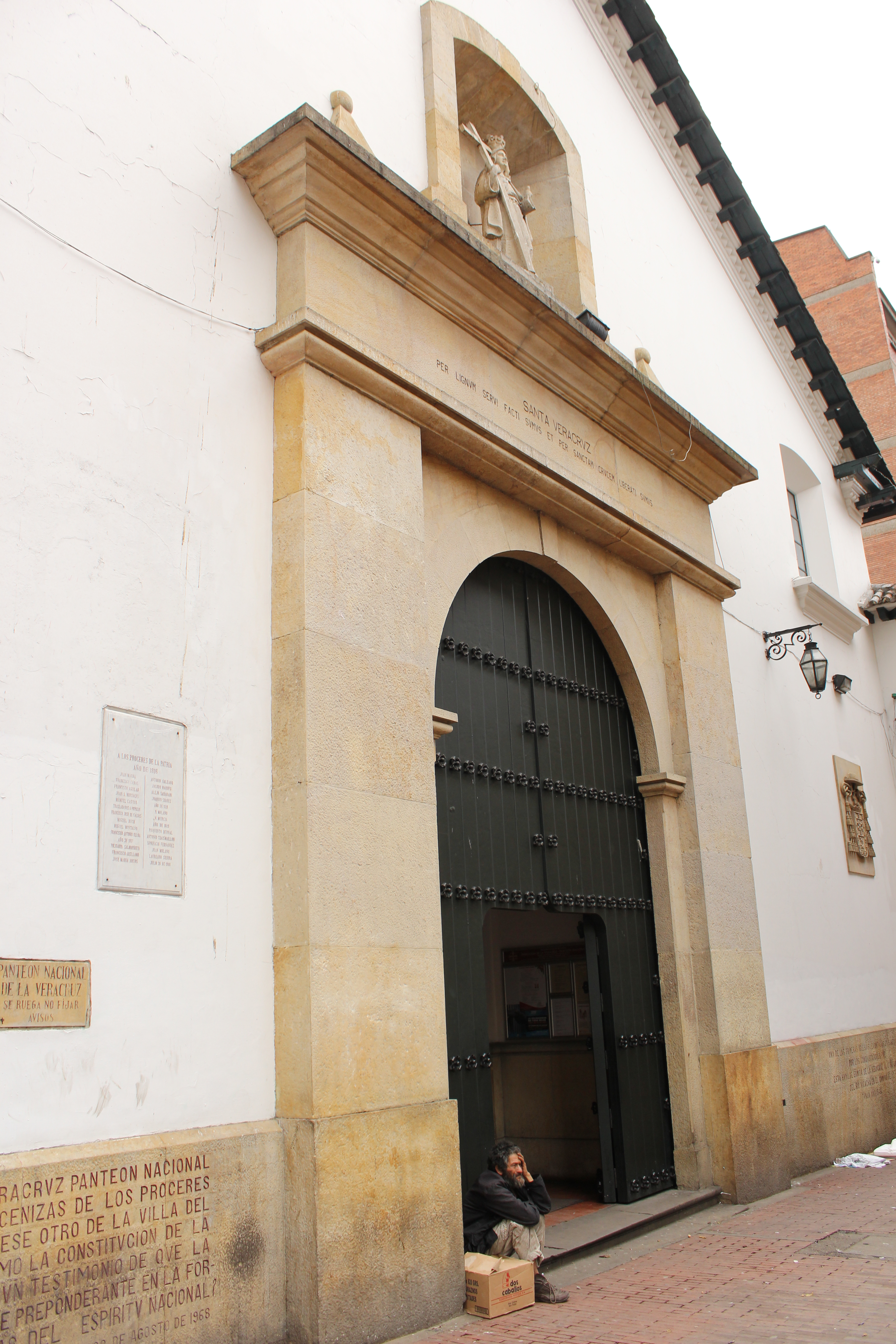 Un feligrés a la entrada